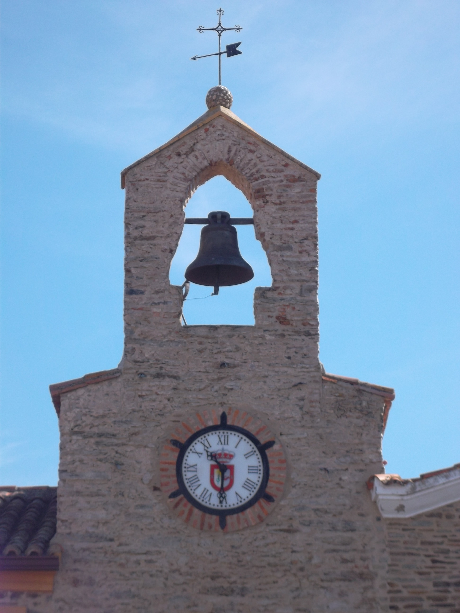 La iglesia de San Bartolo, patrón de Aldeacentenera un pueblecito de la provincia de Cáceres en Extremadura, España.